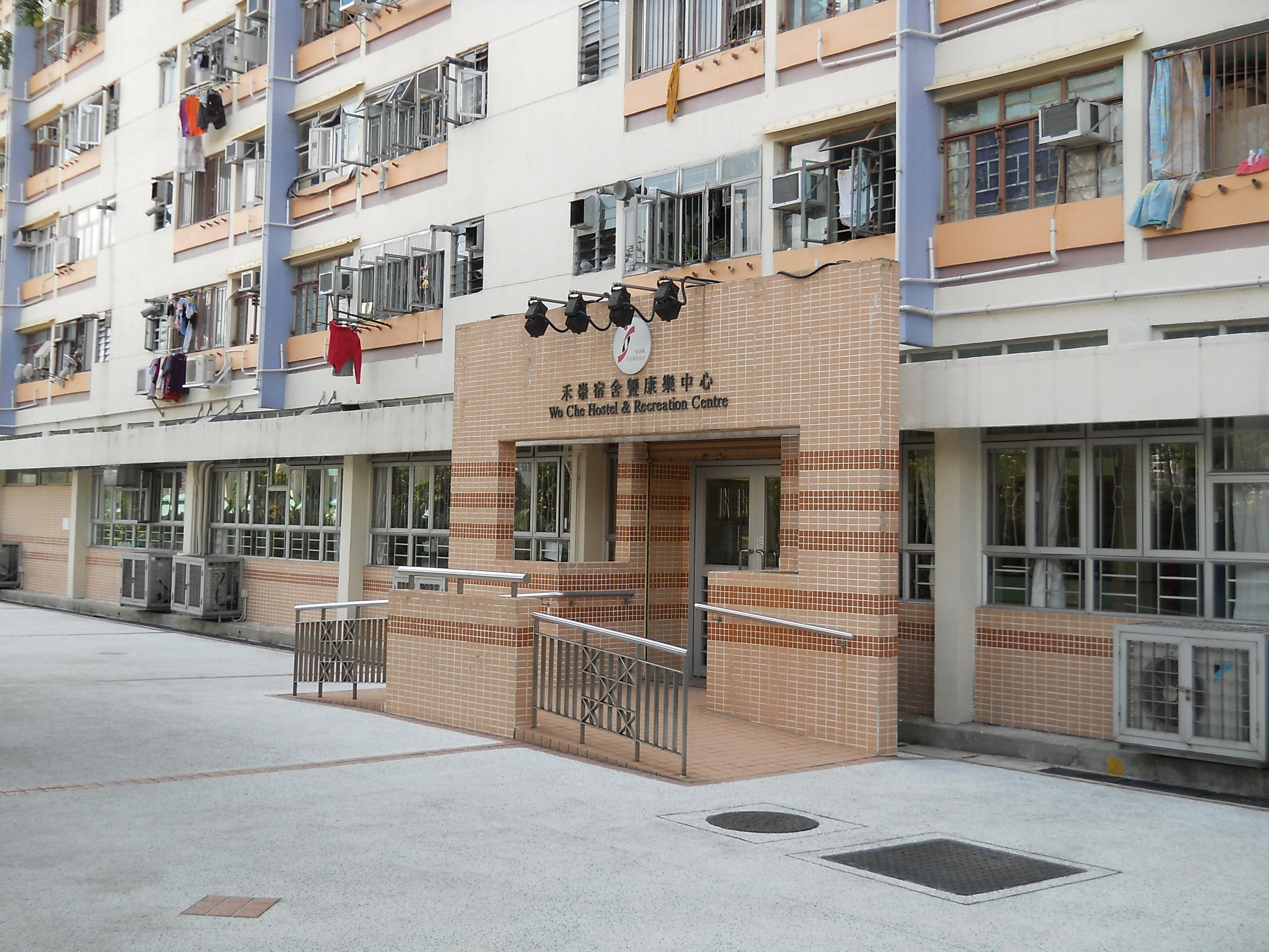 中文（香港）: 香港耀能協會禾輋宿舍暨康樂中心